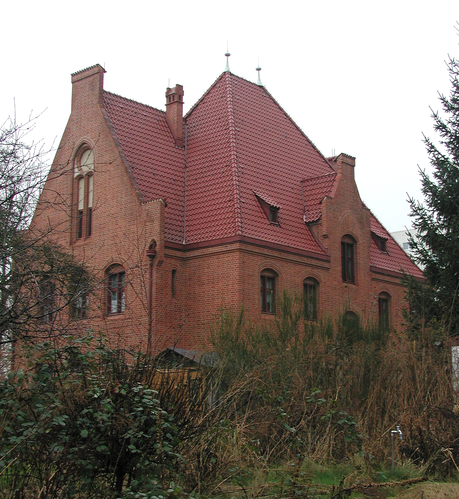 Berlin, Lichtenberg, Landsberger Allee, Wasser-Zwischenpumpwerk: ein Wohnhaus auf dem Gelände